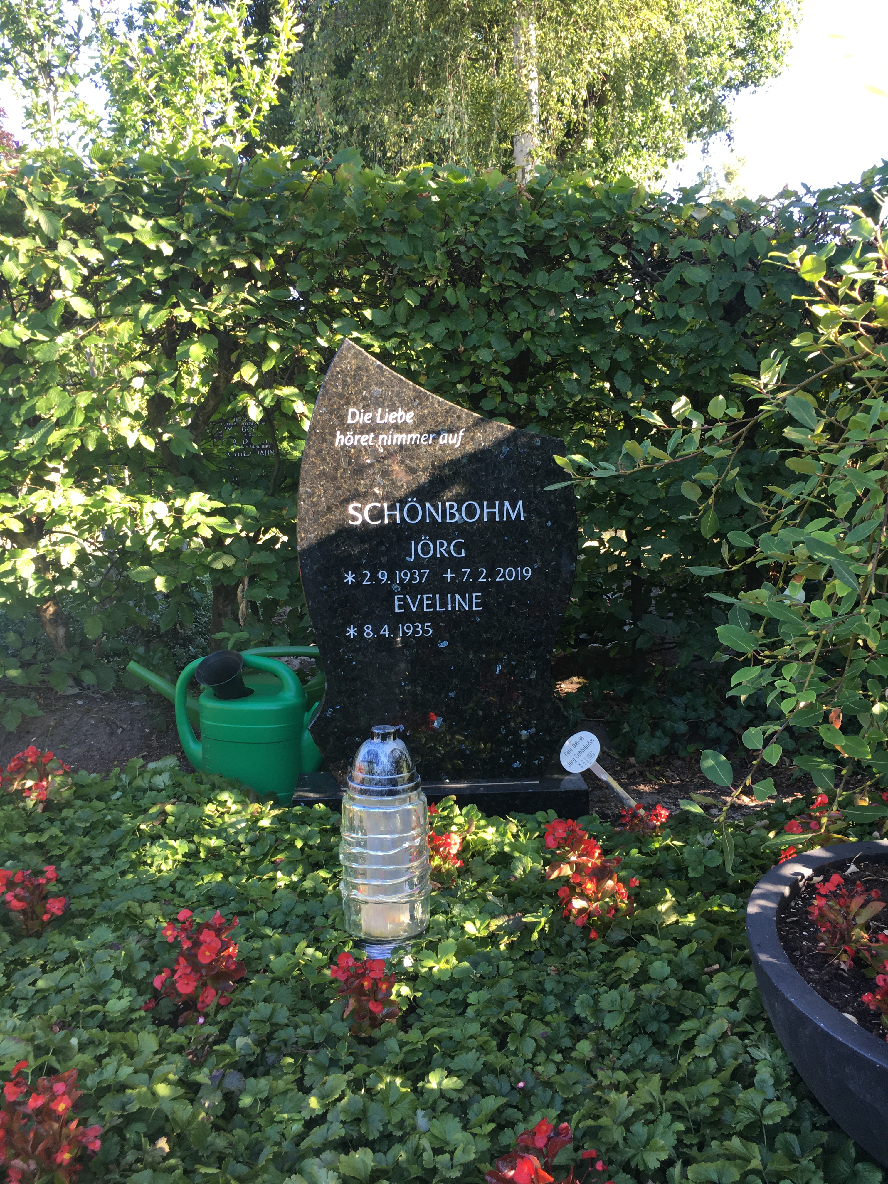 Grabstätte Jörg Schönbohm